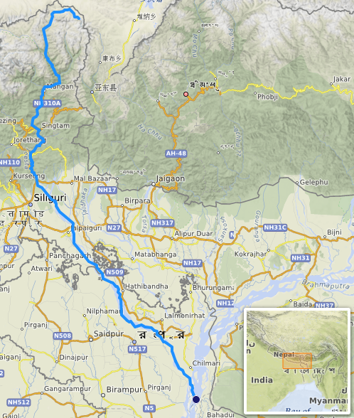 carte réalisée sur umap, ([1]) This map may be incomplete, and may contain errors. Don't rely solely on it for navigation.